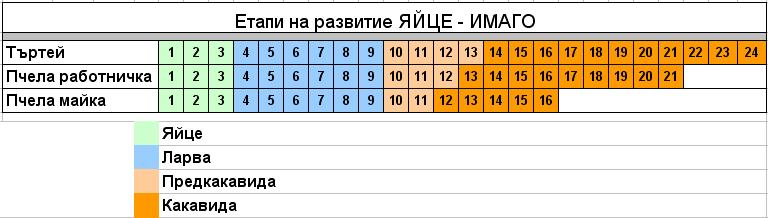 Схема на развитие на пчелите.